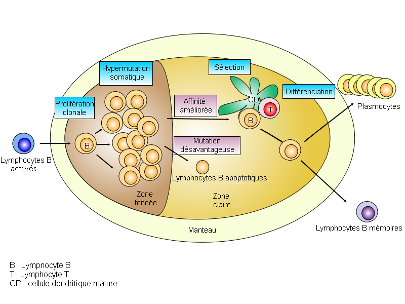 Schéma de la maturation d'affinité dans un centre germinatif